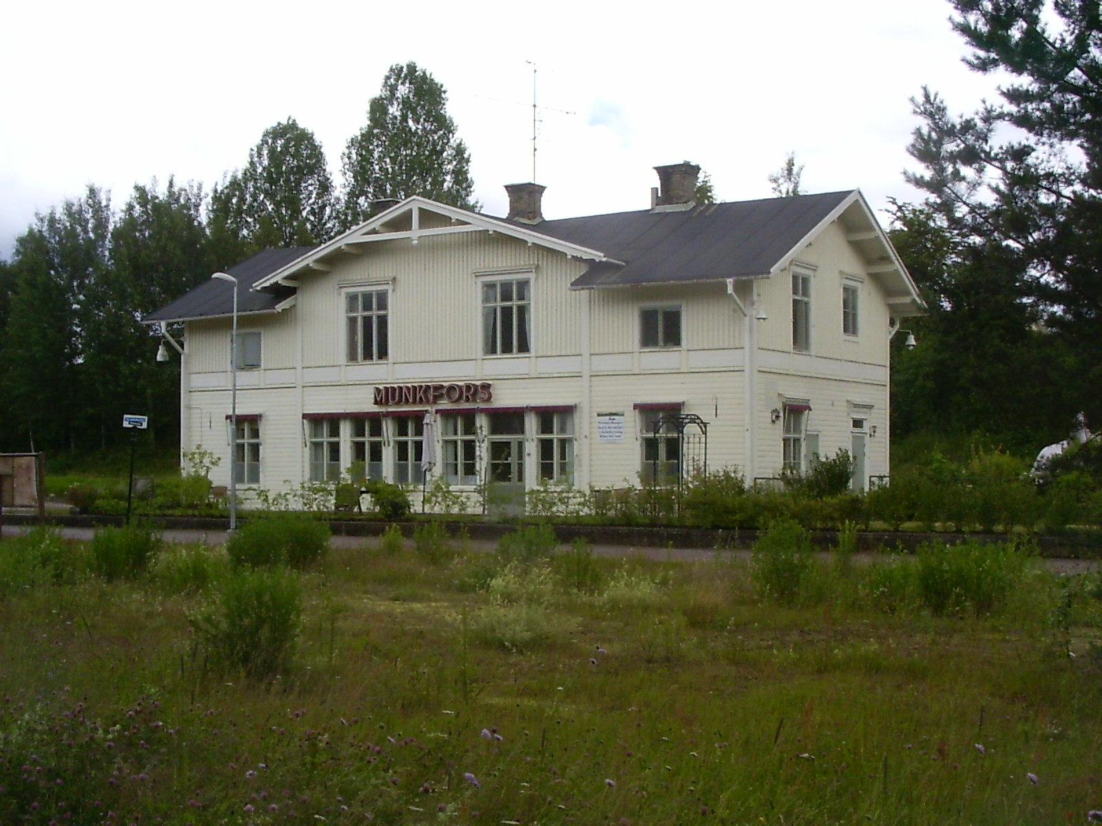 Munkfors, voormalig station